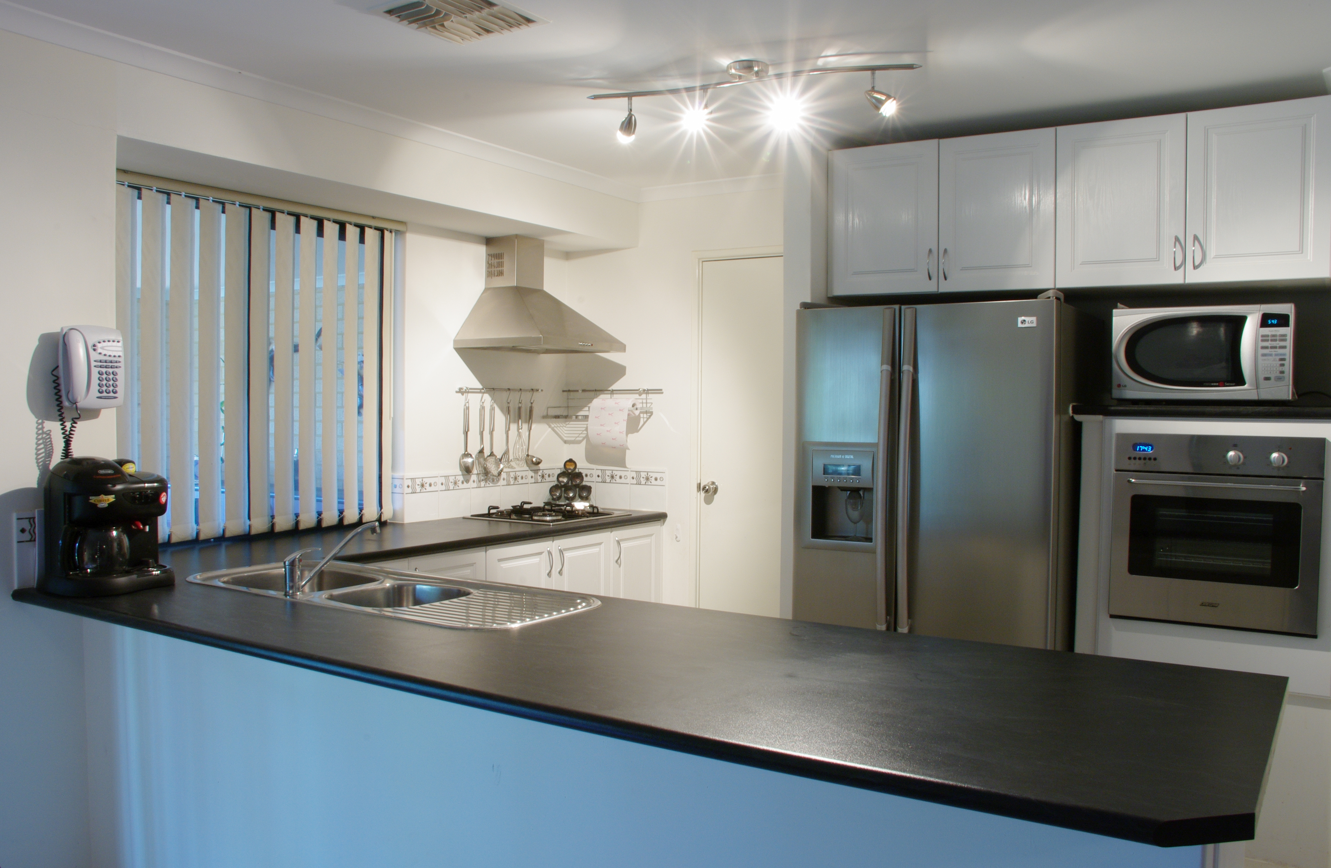 Modern kitchen